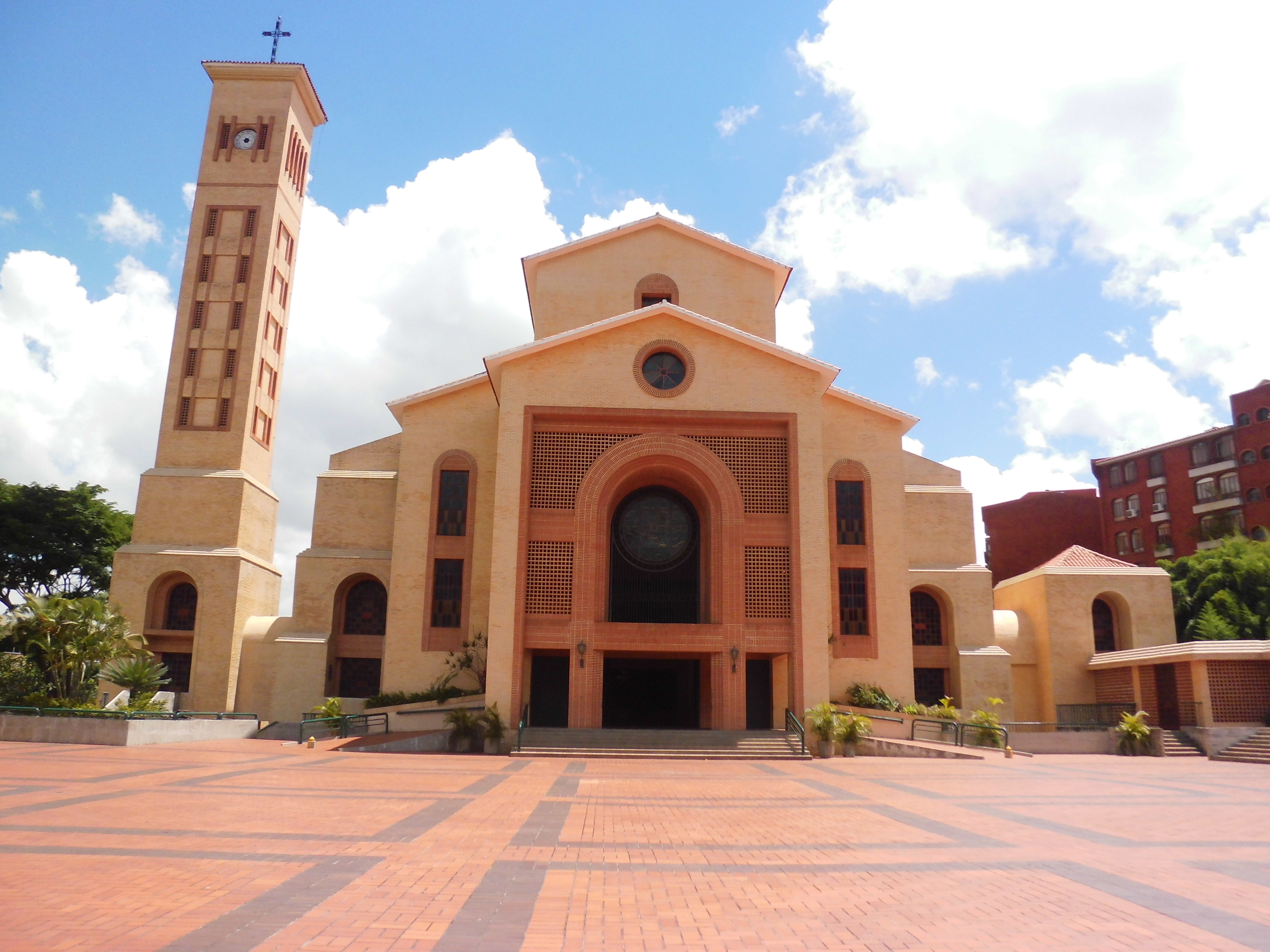 Iglesia de Sagrada Familia de Nazaret y San JoseMaria - La Tahona, municipio Baruta, estado Miranda - Venezuela.